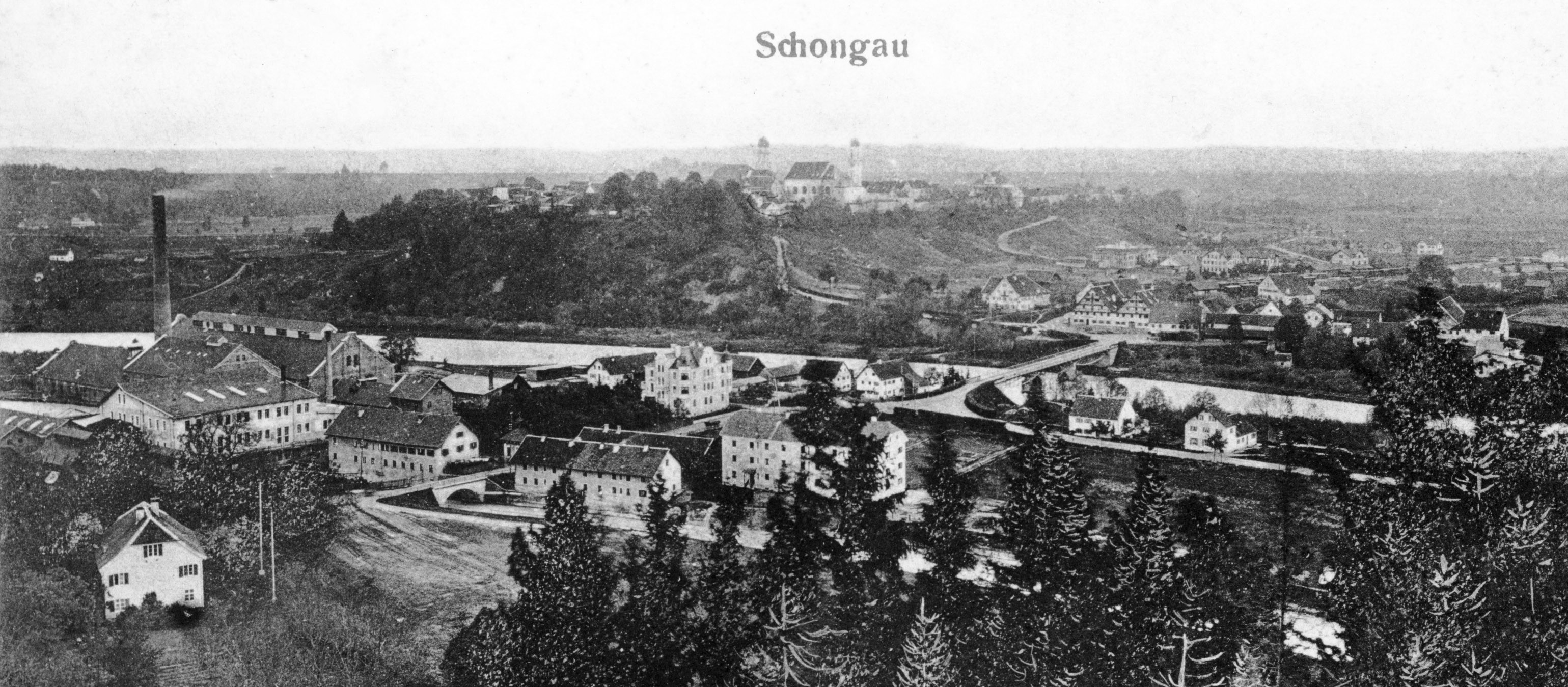 Schongau von Süden gesehen. Links im Vordergrund das Werk der Papierfabrik Haindl (heute UPM-Kymmene), dahinter der Lech, dahinter die Altstadt auf dem Lechumlaufberg, um 1909. Ausschnitt aus einem Ansichtskartenfoto.